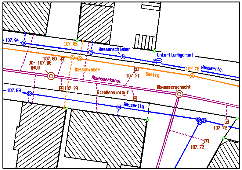 Auszug aus einem Spartenplan